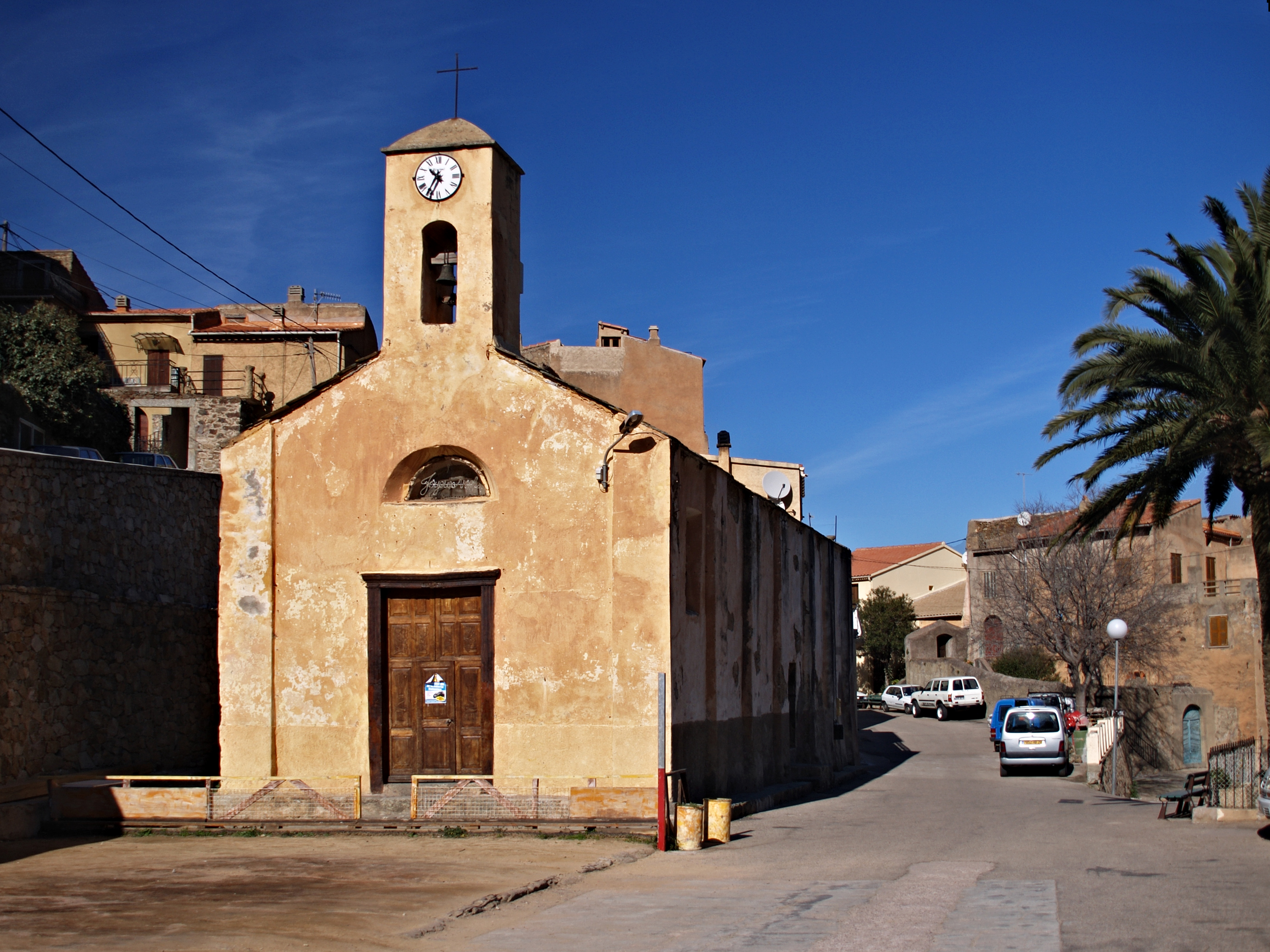 Occhiatana, Balagne (Haute-Corse) - Ancienne confrérie Sainte-Croix (Santa Croce) dite A Nunziata.